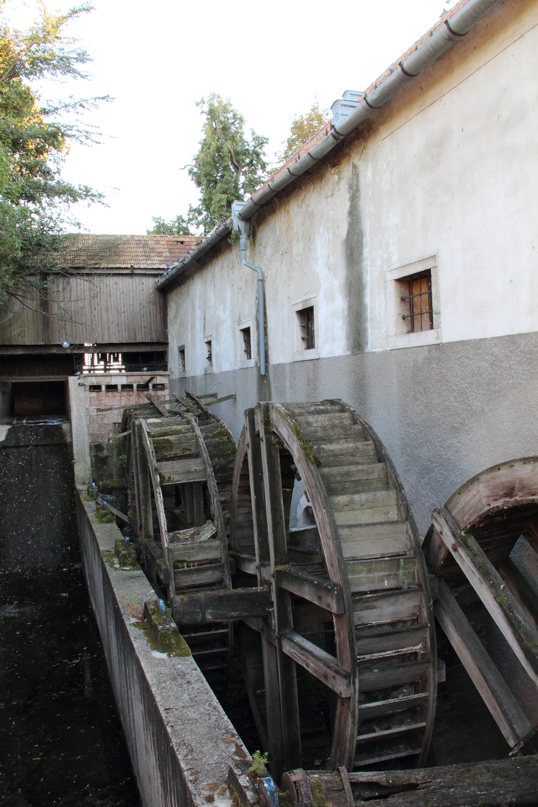 Cifra malom (Tata, Váralja utca) This is a photo of a monument in Hungary. Identifier: 6472